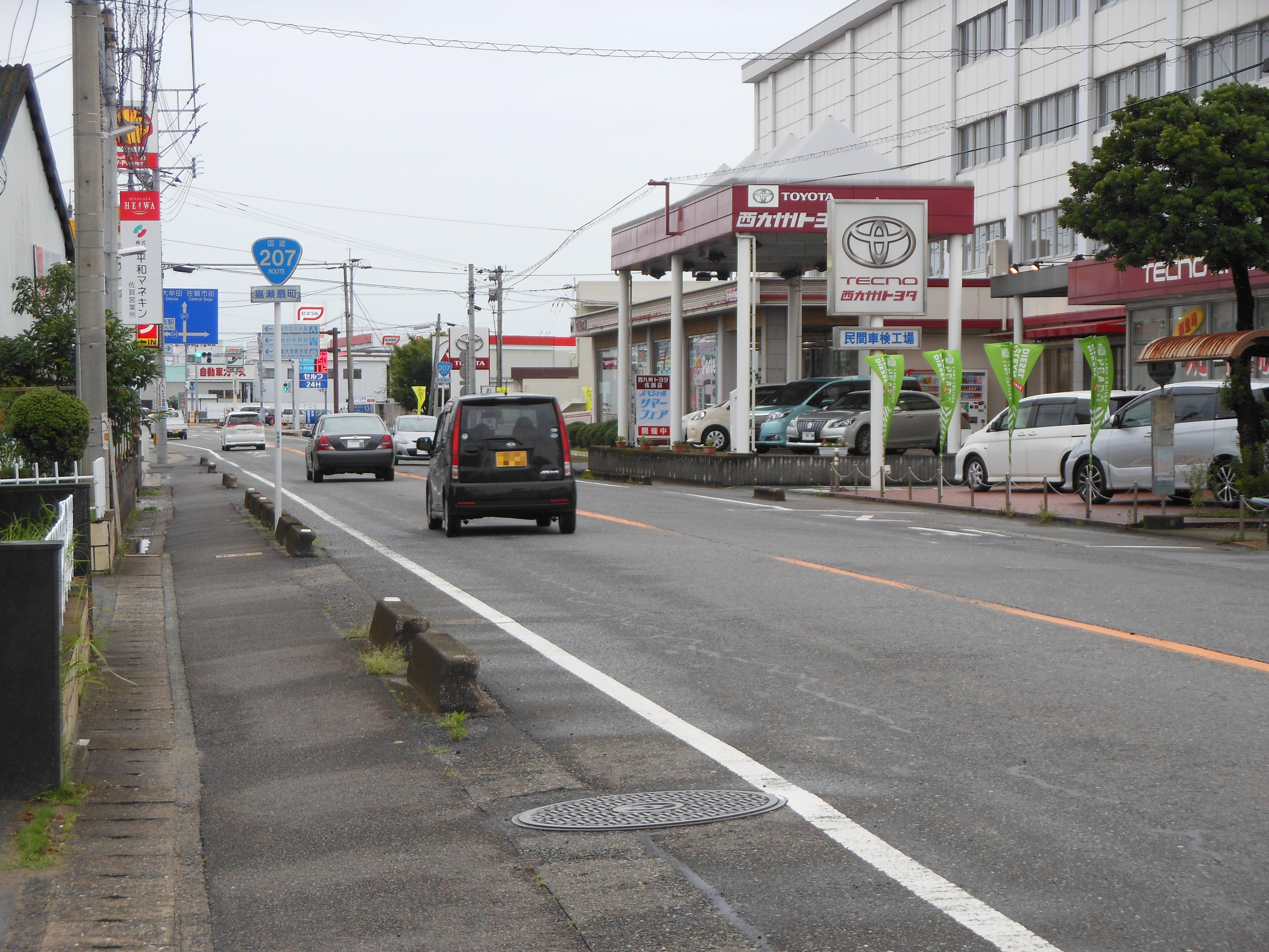 国道207号、佐賀県佐賀市嘉瀬町大字扇町付近。